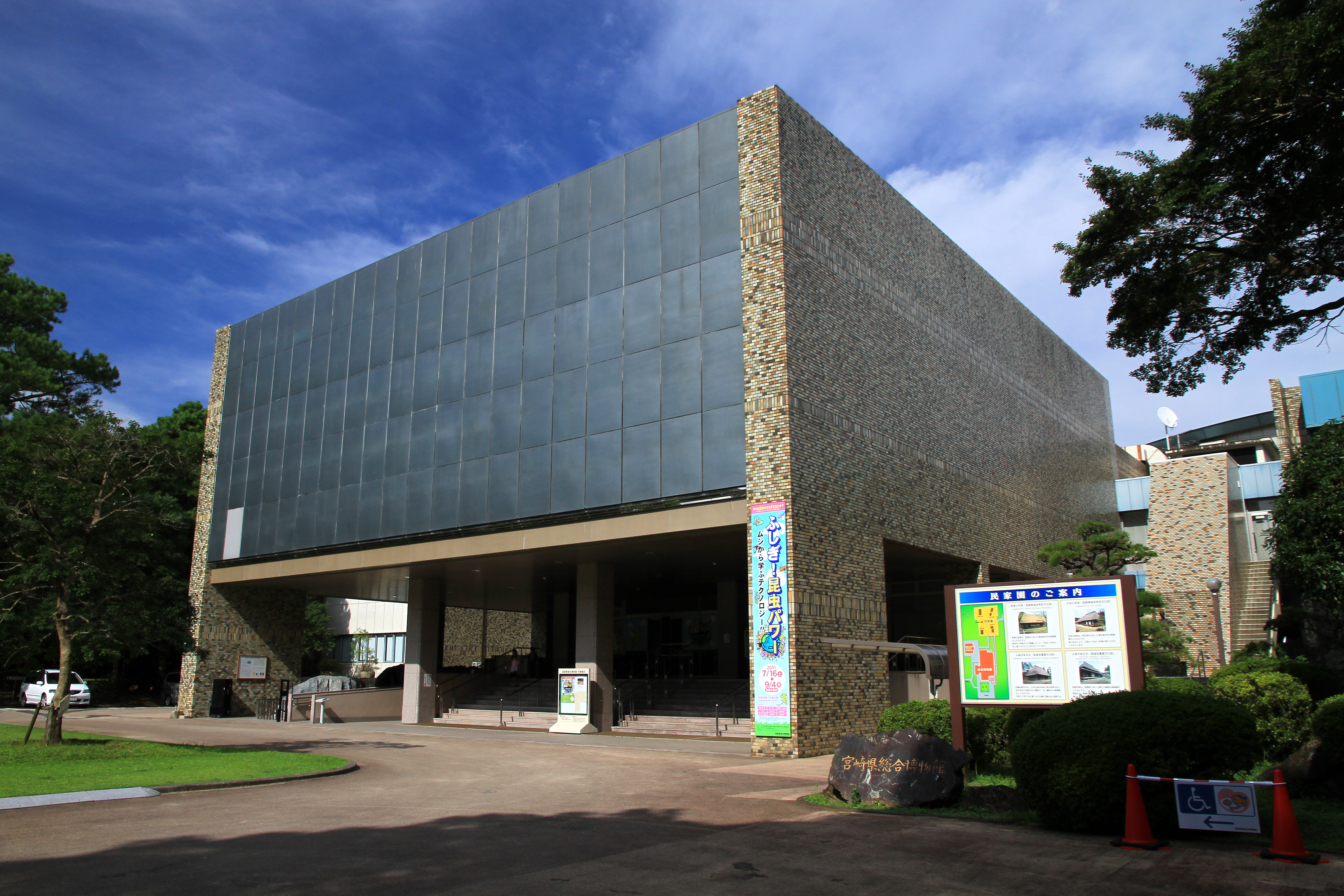 Miyazaki Prefectural Museum of Nature and History, Miyazaki, Miyazaki, Japan